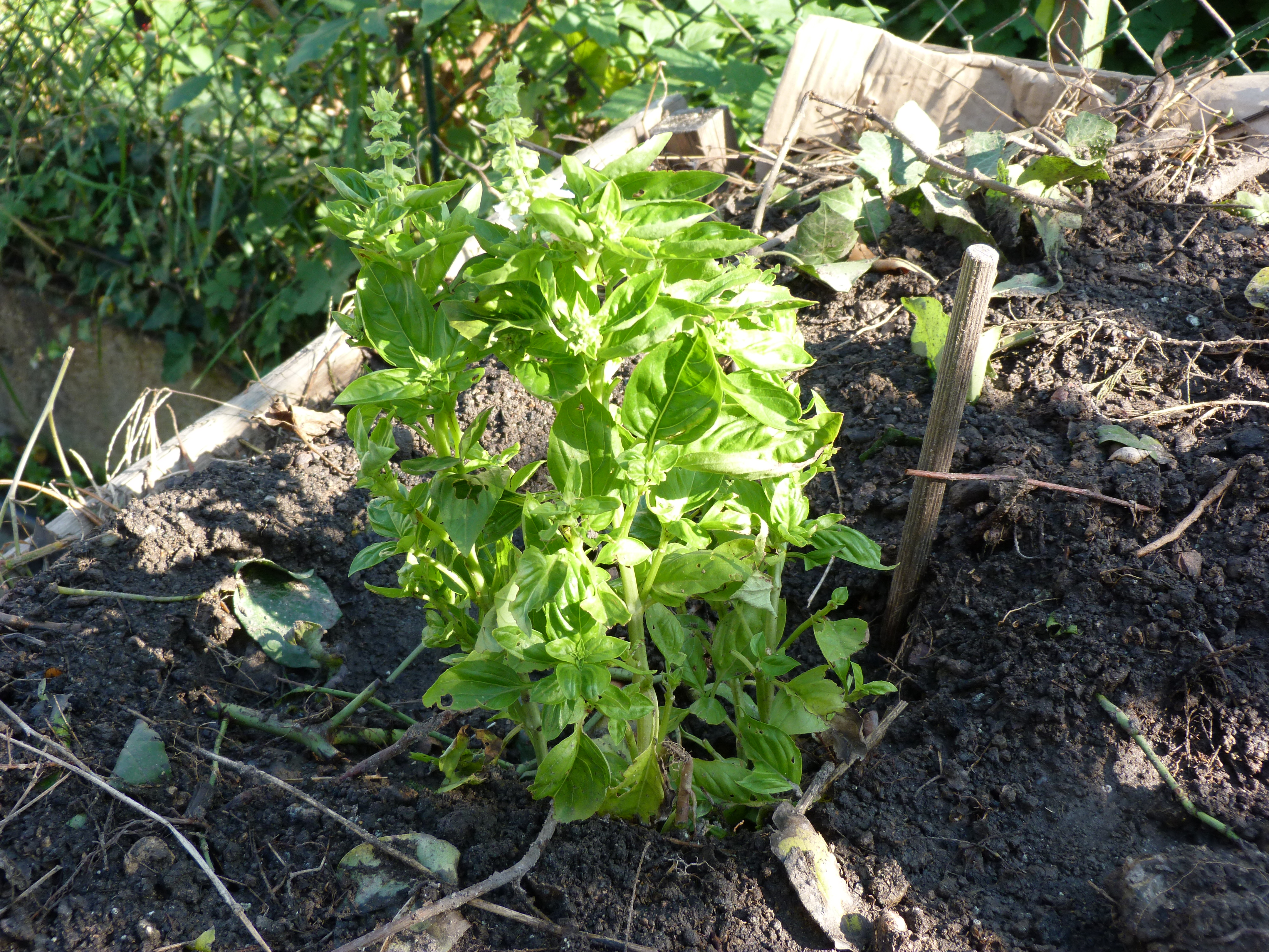 A felvétel 2014. október 19-én készült Budapesten, Budán. Bazsalikom. ©© Derzsi Elekes Andor, Budapest, 2014, A kép és filmfelvételek egészben, vagy részletekben másolását, bármilyen úton történő sokszorosítását és felhasználását a szerző ellenérték nélkül, jogutódjaira is kihatóan megengedi. Az engedély kiterjed a kereskedelmi célú hasznosításra is. Kéri azonban nevének feltüntetését a felhasználás során. A Metapolisz sorozat valamennyi képe és filmje Creative Commons alatti valamint kereskedelmi - for profit - célra is felhasználható. Ajánlott hivatkozás: Derzsi Elekes Andor: Metapolisz DVD line